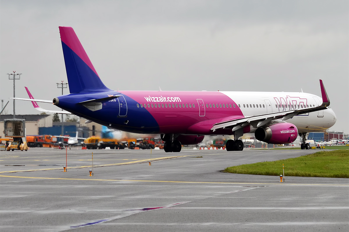 Wizz Air UK, G-WUKG, Airbus A321-231